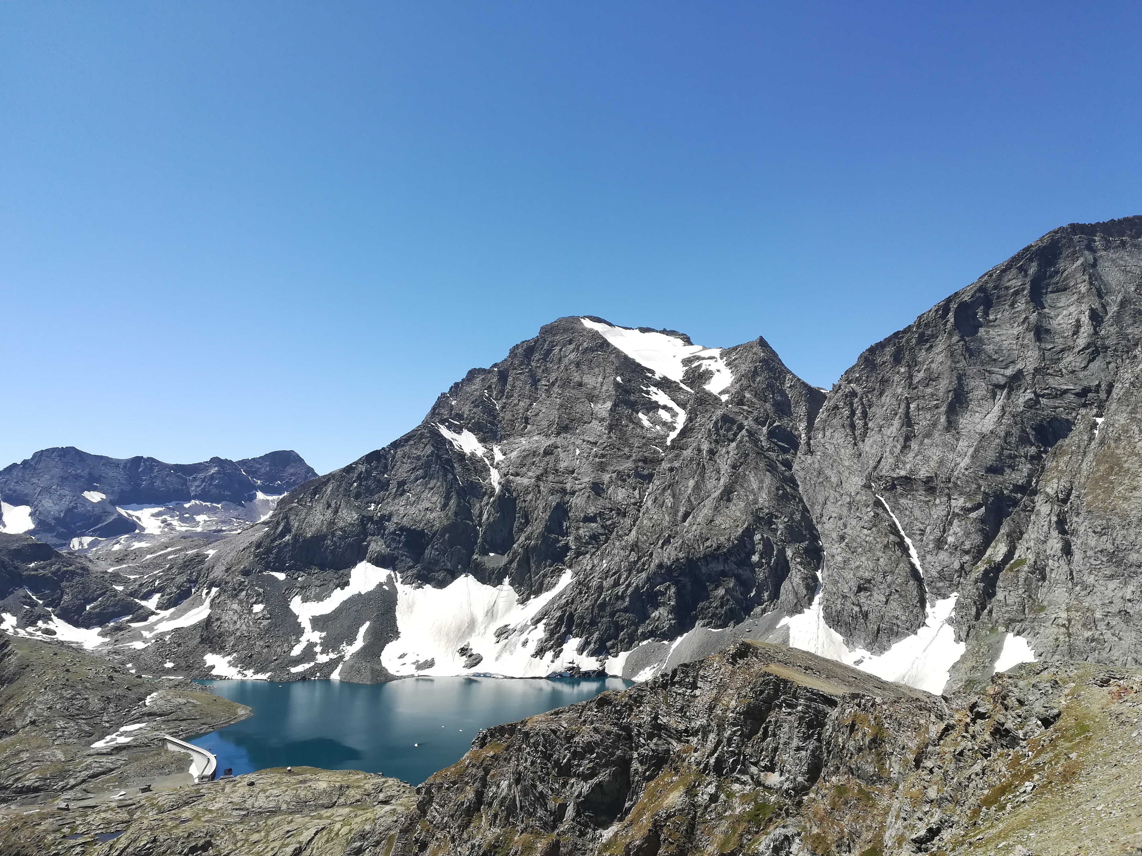 Il lago della Rossa e dietro il monte Croce Rossa ammantato dal ghiacciaio pensile visti dalla Punta Fortino